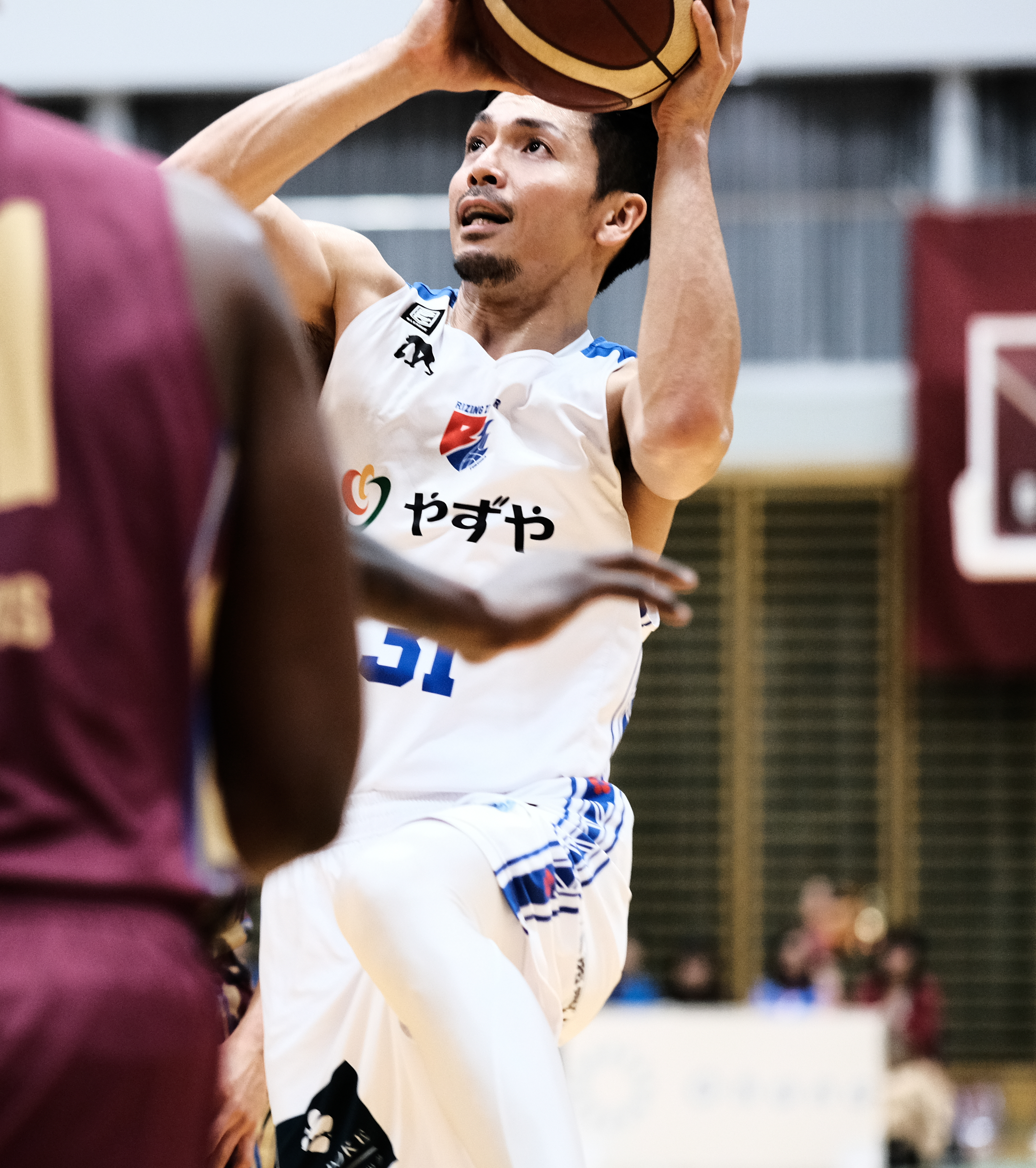 20191123 11月23日 越谷アルファーズ vs ライジングゼファー福岡